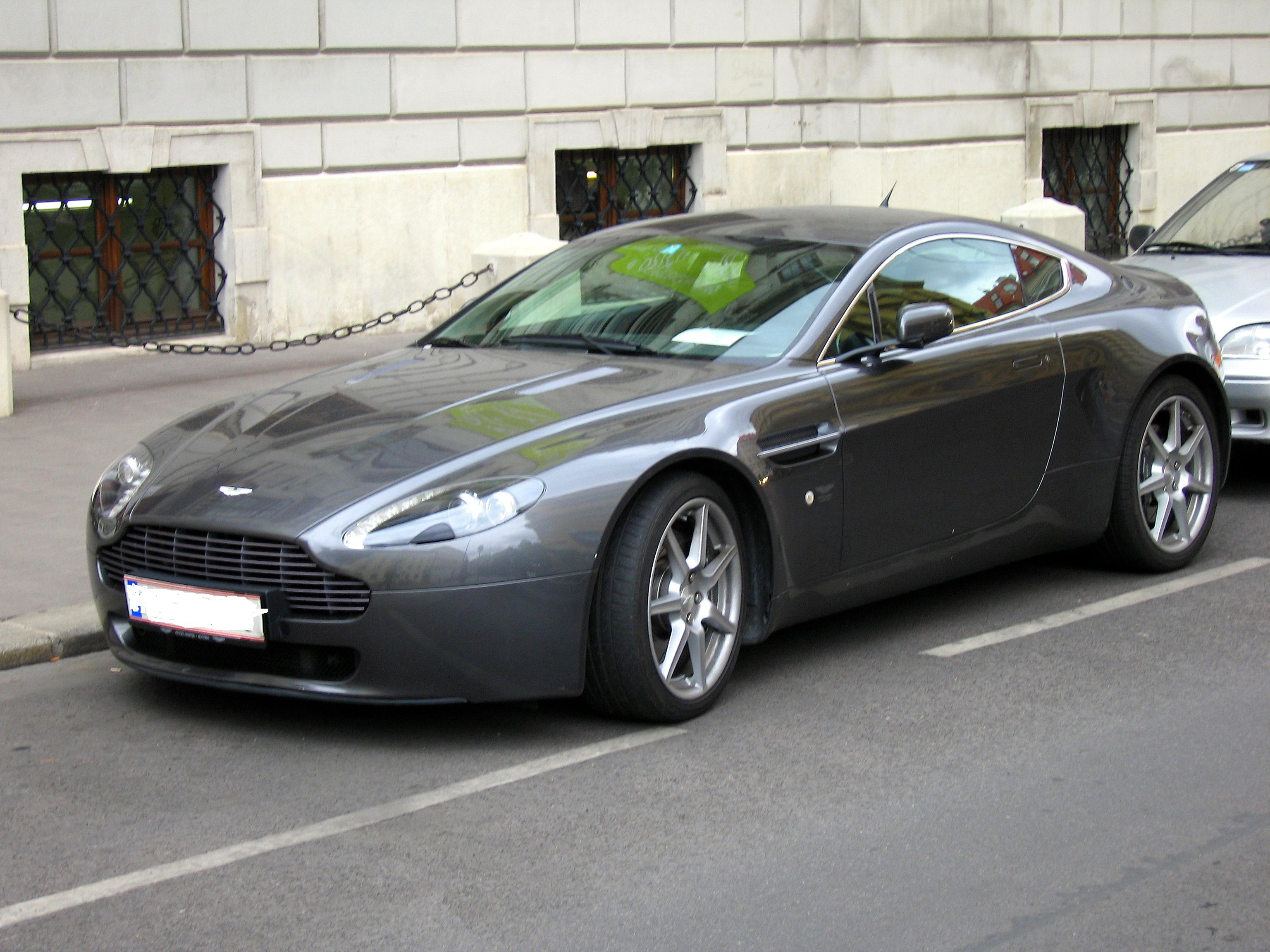 Aston Martin Vantage V8